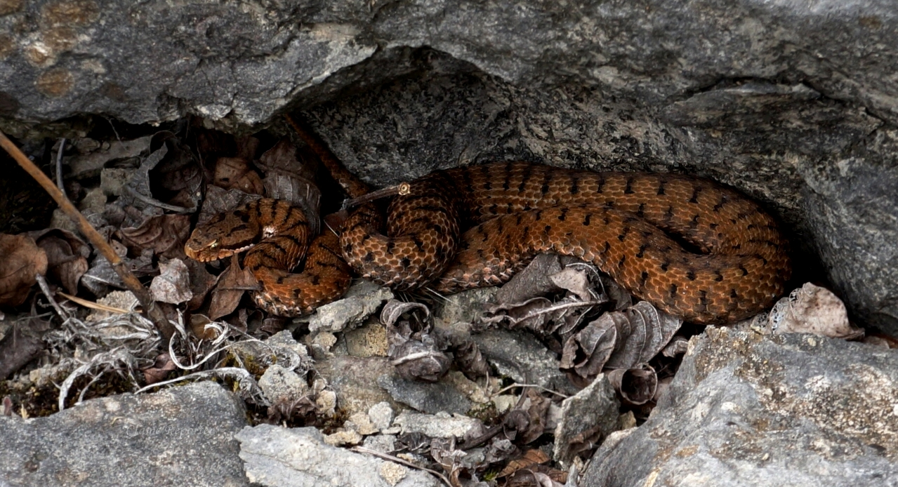 Vipera Aspis dans son milieu naturel, et plus précisément dans son lieu d'insolation qui se situe à la sortie d'une petite cavité rocheuse. Elle peut s'exposer au Soleil pendant de longues heures car c'est un animal à sang froid (température dépendante de la chaleur ambiante) mais aussi pour faciliter la digestion d'une proie car la chaleur accélère le processus d'ingestion. Lors des heures les plus chaudes, elle passe son temps à l'abri du soleil, sous une pierre ou dans la végétation. Elle privilégie les écotones, entre milieux secs et embroussaillés comme ici en l’occurrence. En période estivale, la majorité de son activé est nocturne, matinale et crépusculaire alors que durant les demis-saisons (printemps et automne), elle aura tendance à avoir une activité diurne.